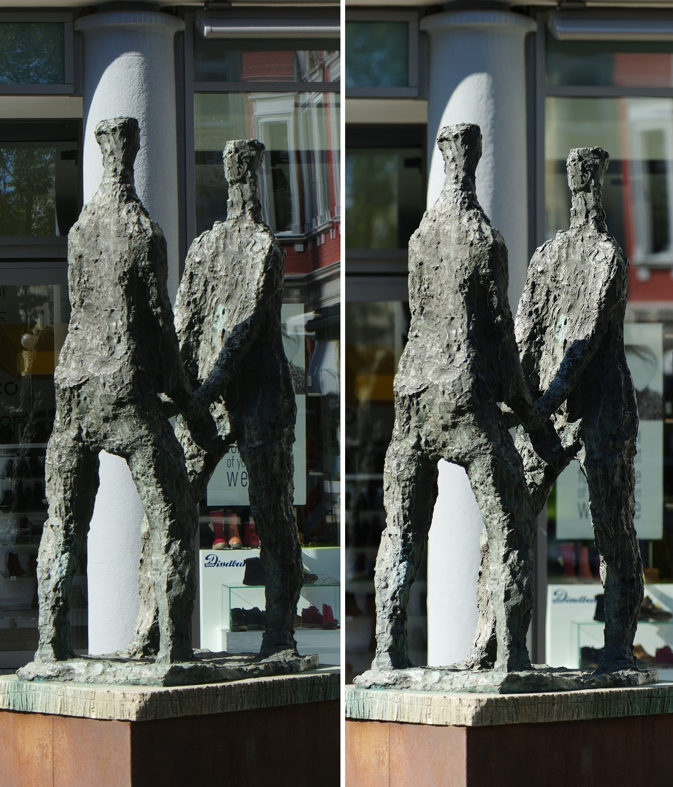 Ernst Oldenburg "Große Begegnung", 1979. Skulptur in der Fußgängerzone in Unna. Vergleich einer normalen Fotografie mit einem Stitching nach der Brenizer-Methode